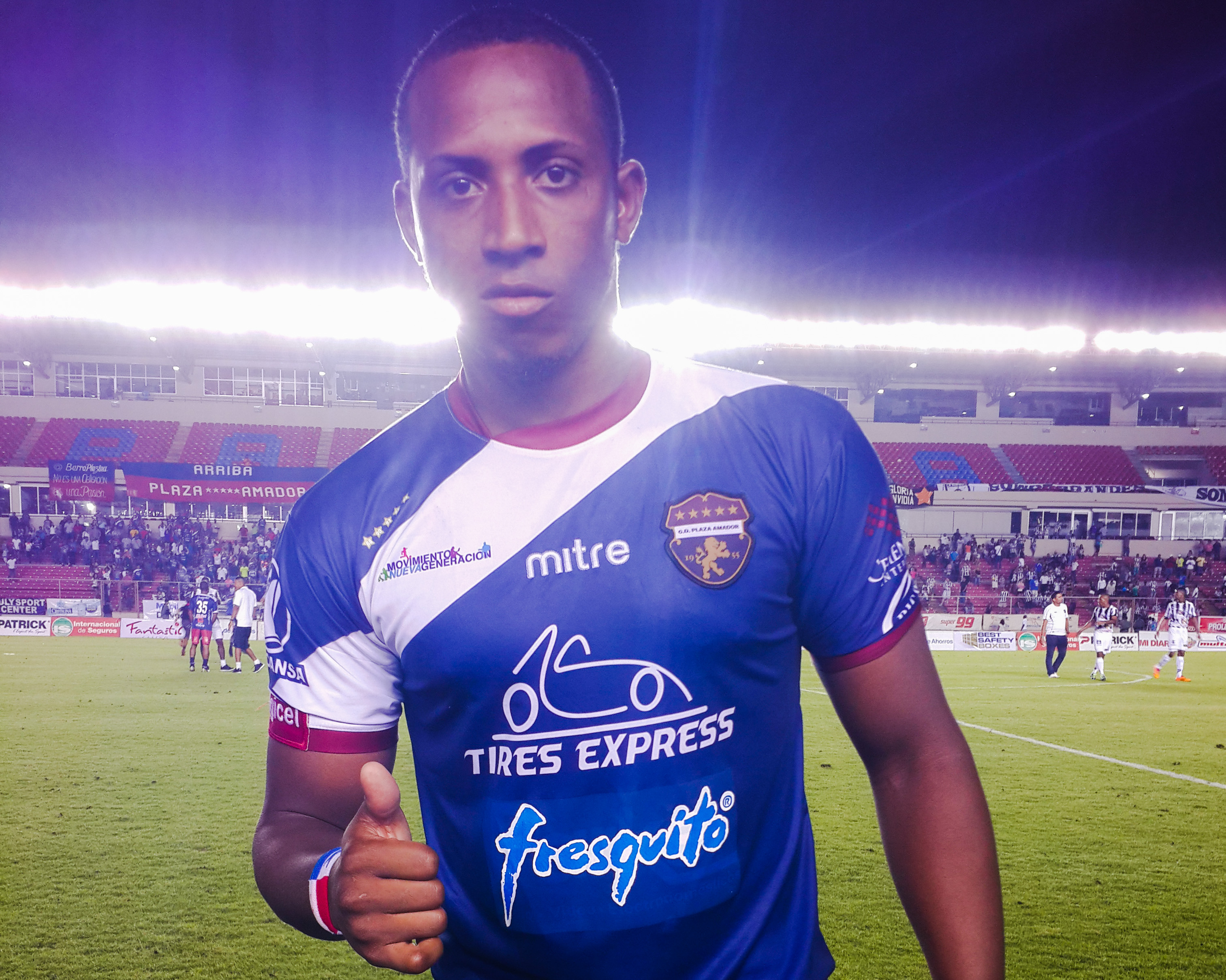 Jugador de Plaza Amador